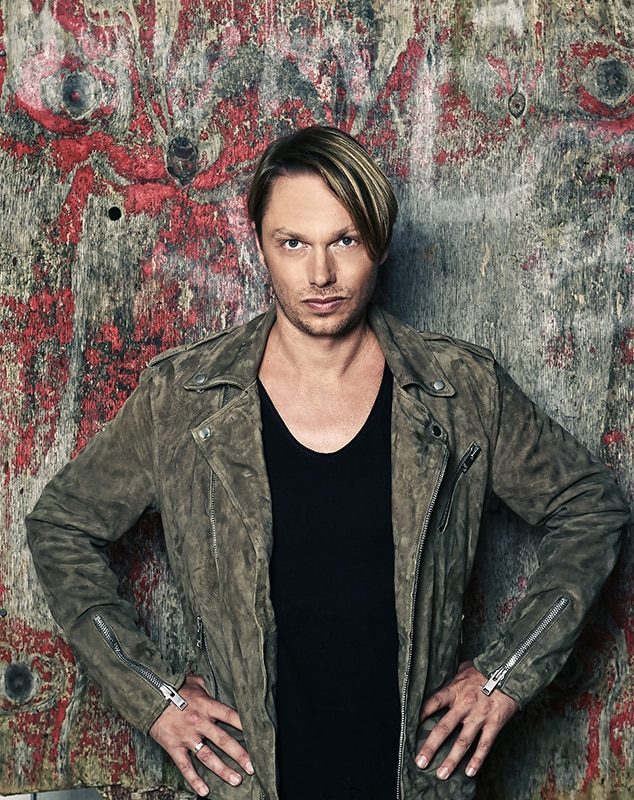 エイベックス・ポータルにて公開されたレジ・ペンクスタンのアーティスト写真